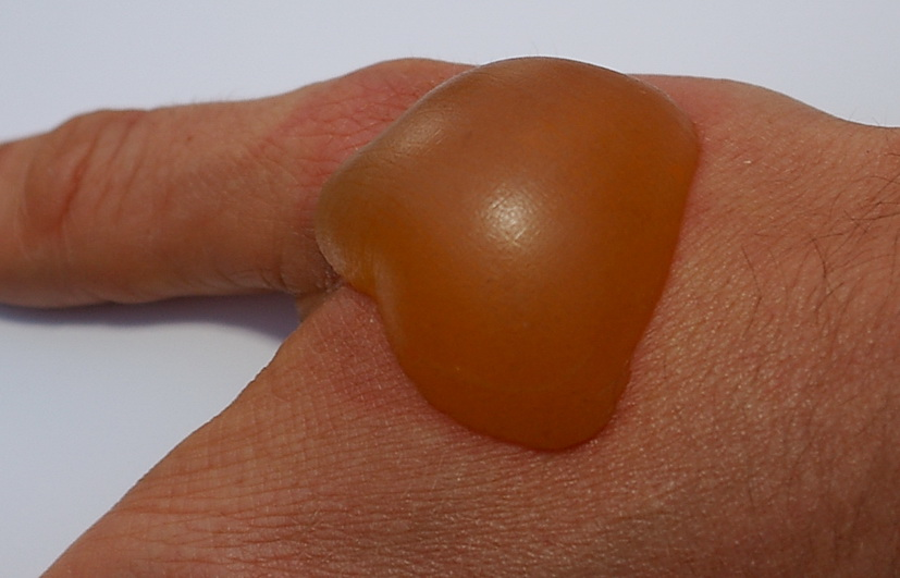 große Brandblase auf männlichem Handrücken